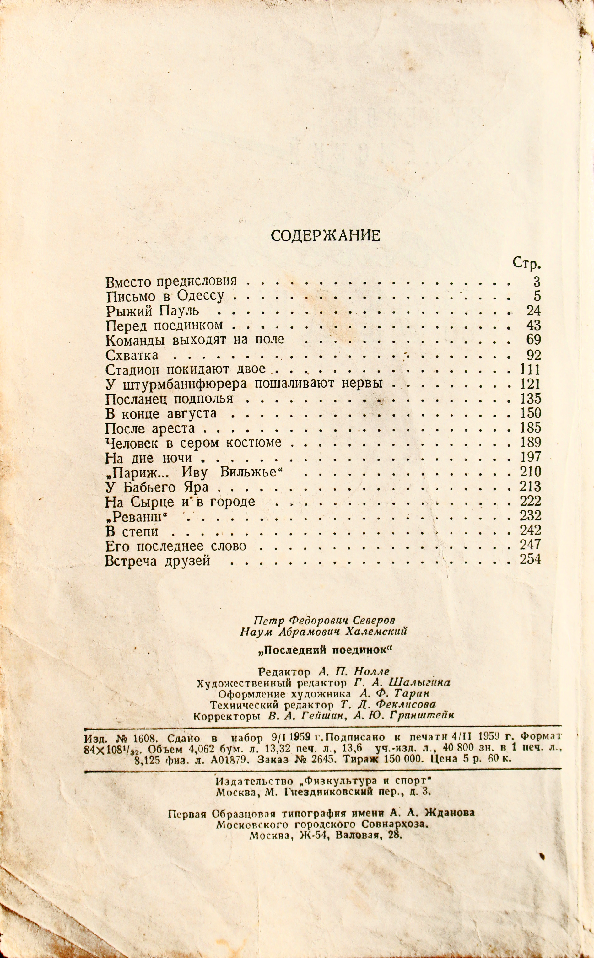 П. Северов, Н. Халемский. Содержание и выходные данные книги "Последний поединок" (М, ФиС, 1959, тираж 150 000, цена 5 р. 60 к.) о "Матче смерти" команд "Старт" (Киев) - "Флакельф" (Люфтваффе) в Киеве, прошедшем в 1942 году.